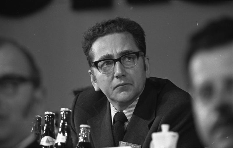 Bundesparteitag der SPD in Hannover 10.-14.4.1973